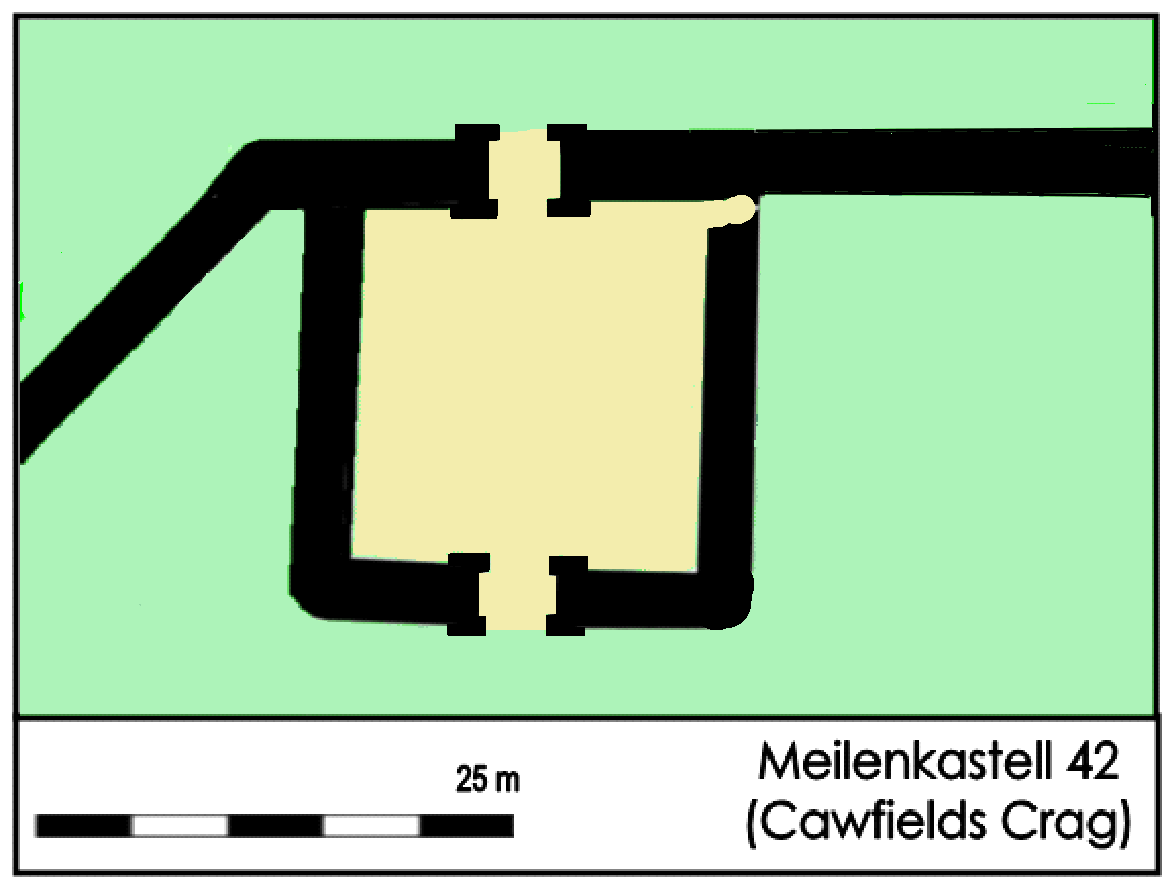 Befundskizze Meilenkastell 42 (Cawfields Crag), Hadrianswall (GB).